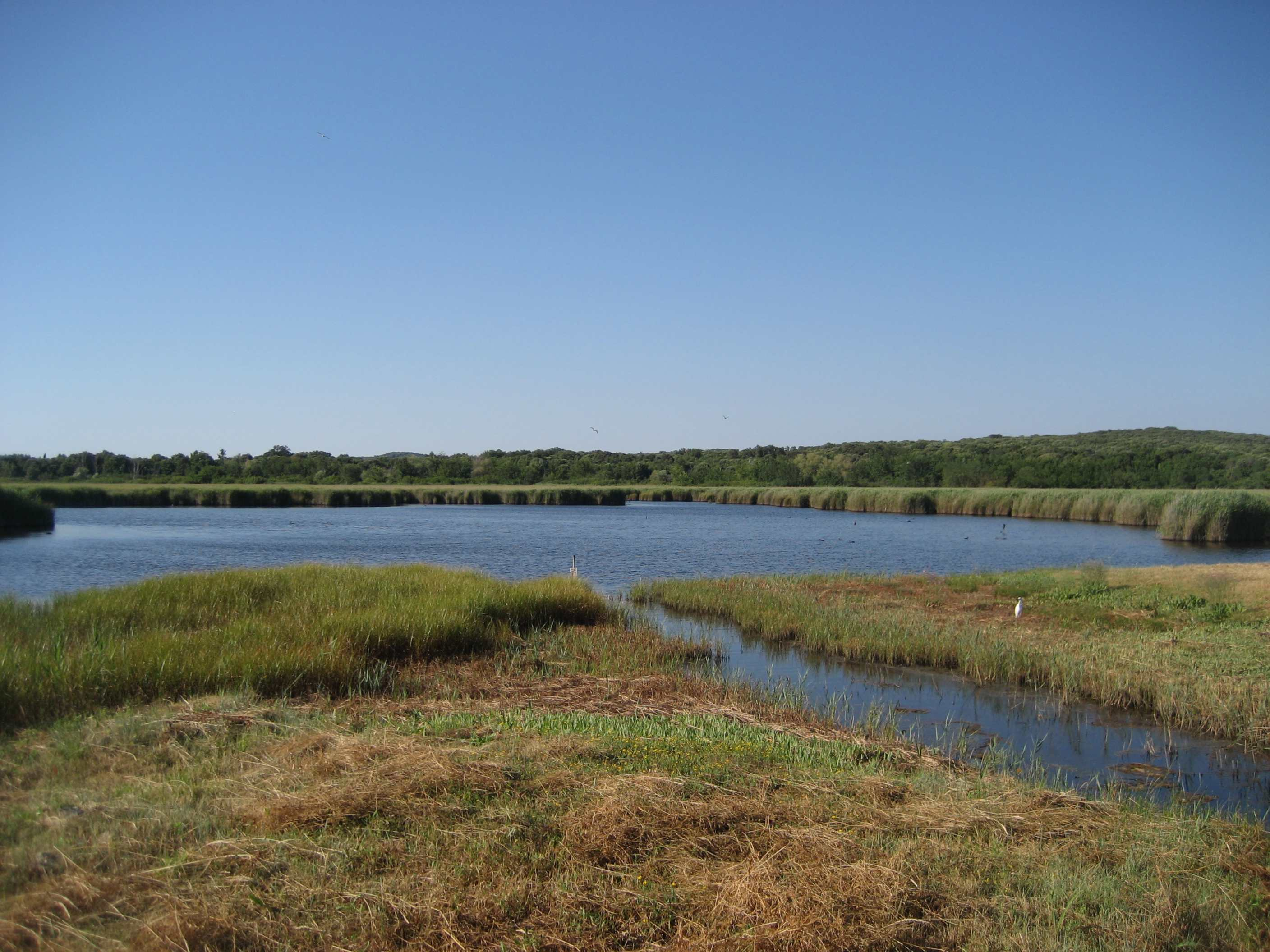 Ornithologische Reservat Palud, Kroatien